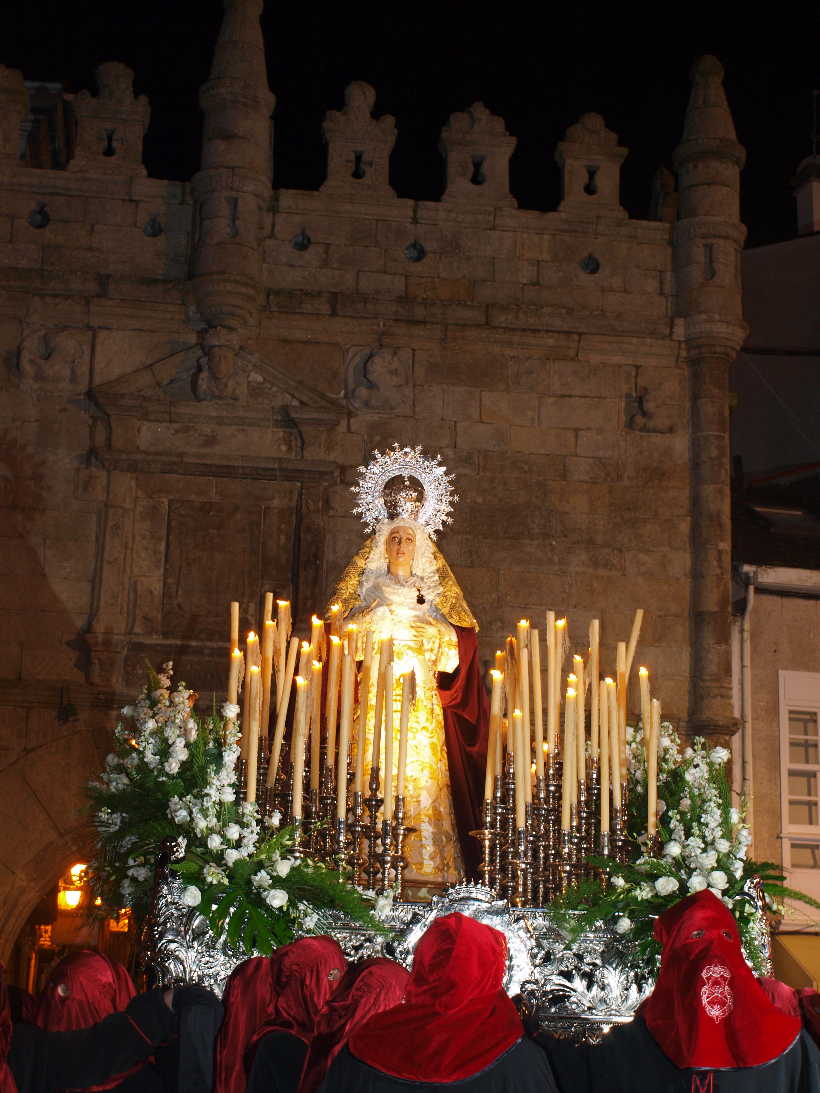 Virxe da Clemencia a carón da Porta de Carlos V - Semana Santa de Viveiro 2011